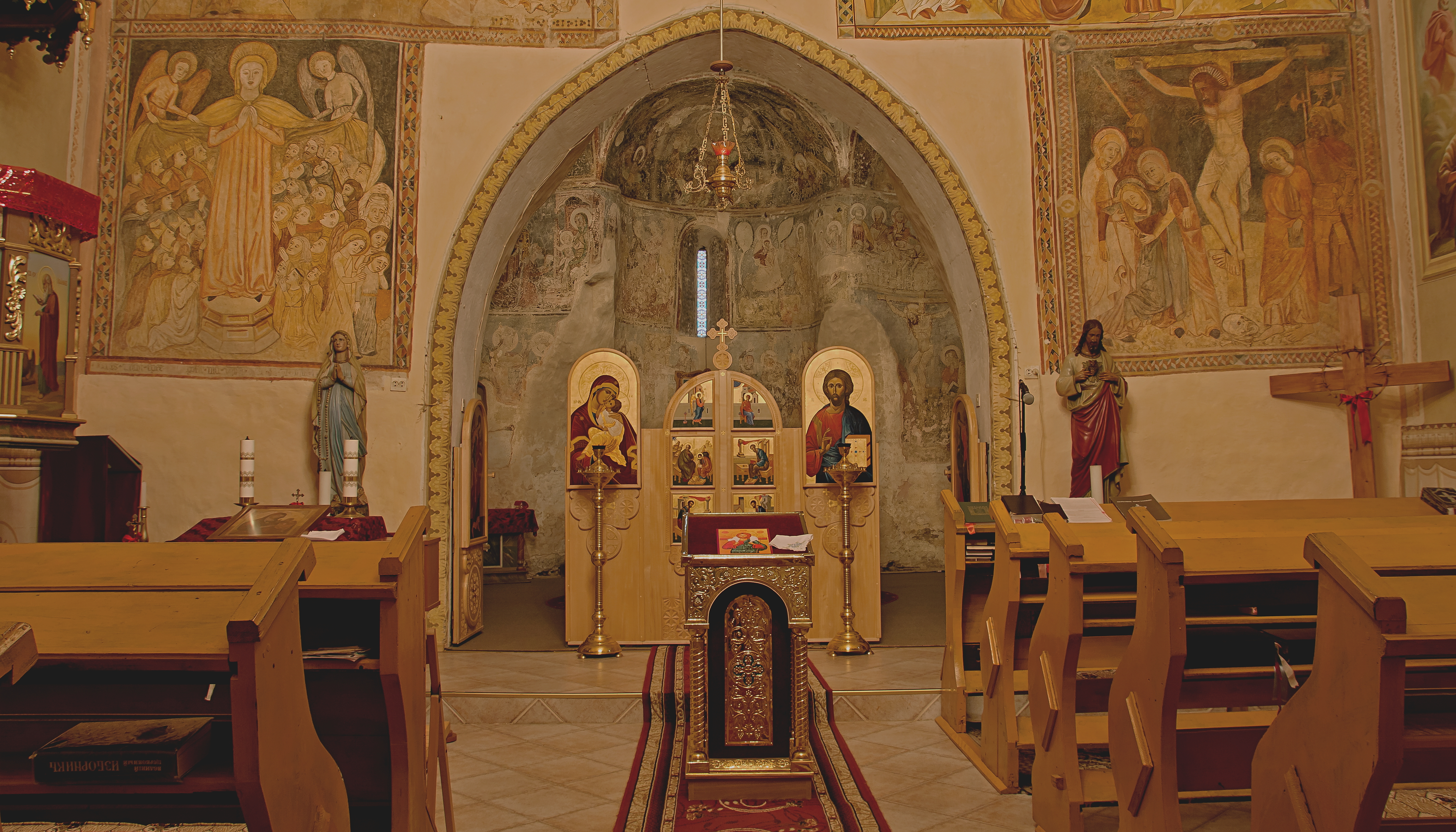 Горянська ротонда